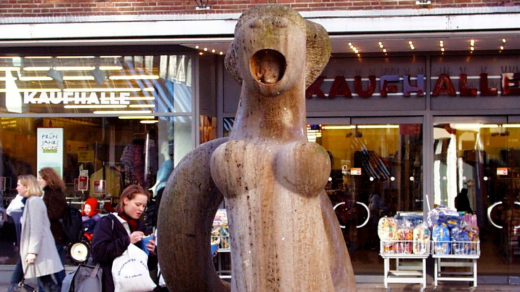 Brunnen-Skulptur Holm-Nixe von Ulrich Beier (1977 ) in Flensburg mit Kaufhalle dahinter